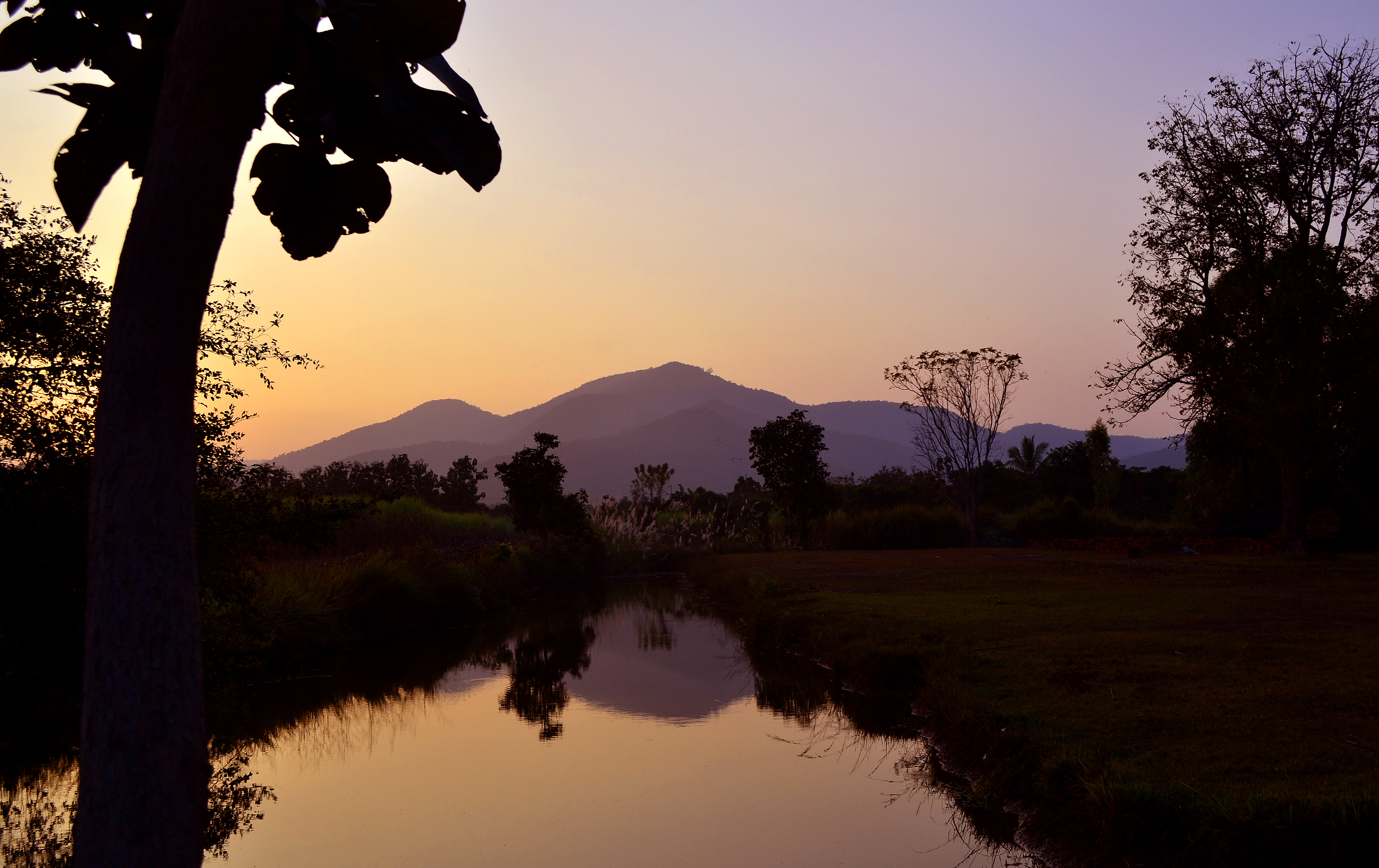 Sonnenuntergang bei Ho Thewalai Mahakaset im Geschichtspark Sukhothai